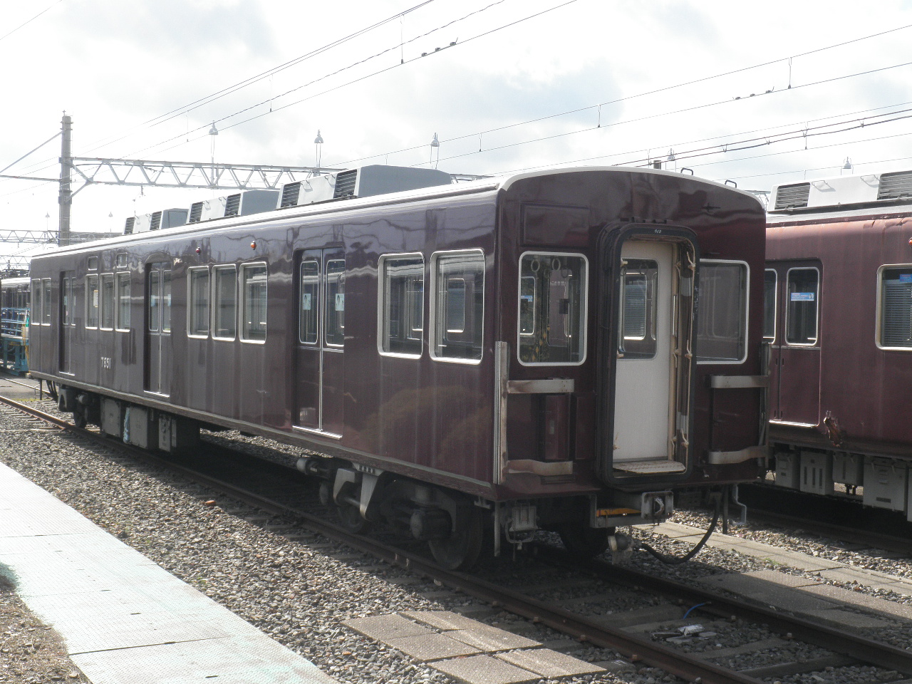 編成から外され正雀車庫で長期休車となっている7851号車